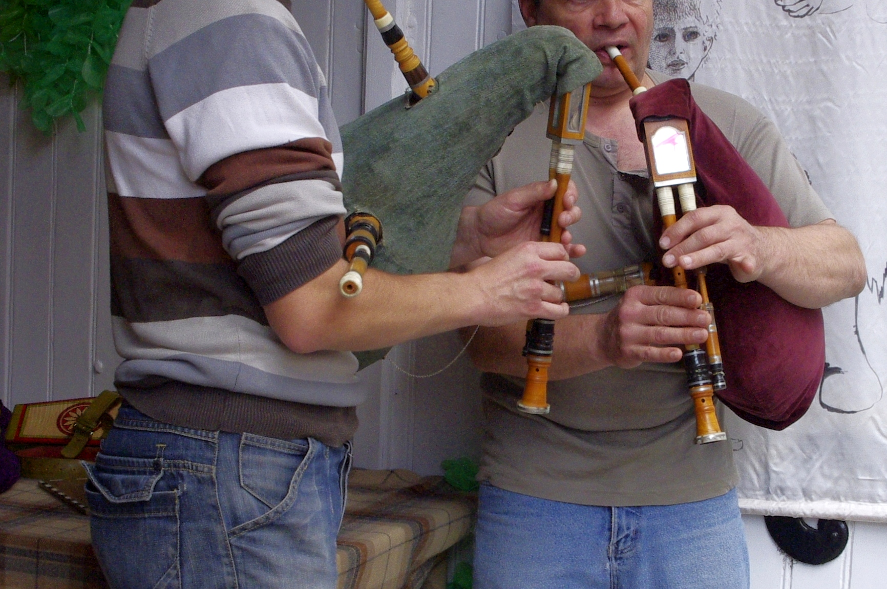 Félibrée à Piégut-Pluviers 2012 - Cornemuses